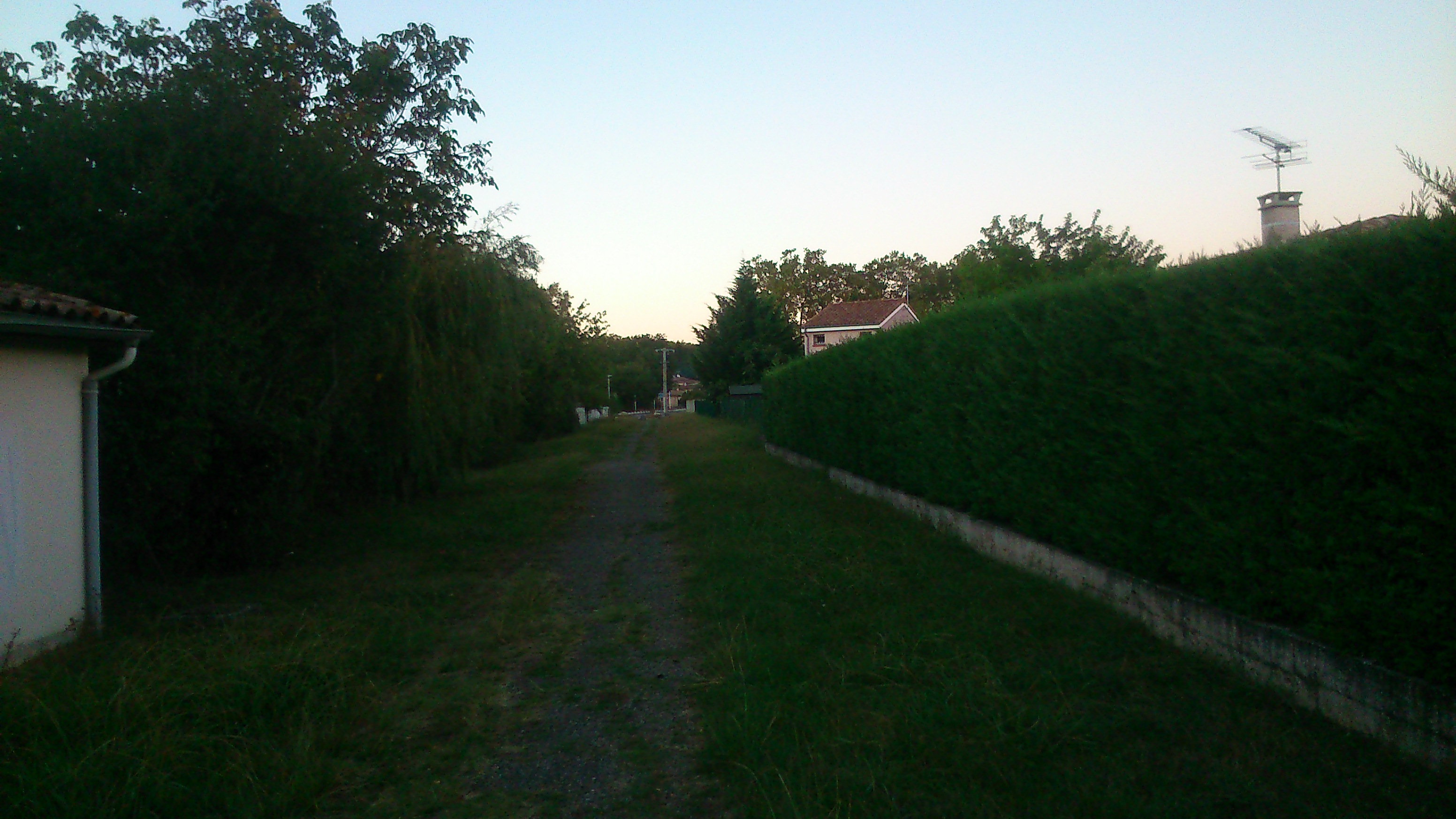 Les anciennes emprises de la gare de Fonsorbes